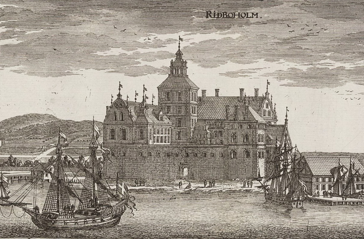 Rydboholms slott